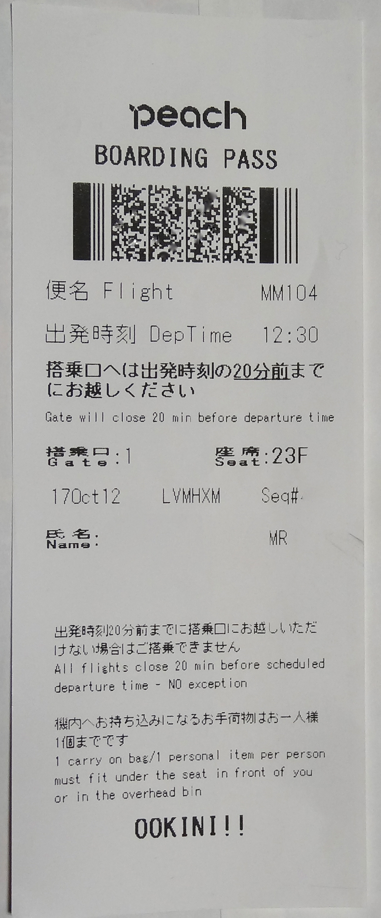 Peachの搭乗券には OOKINI（おおきに）と関西弁で表示。